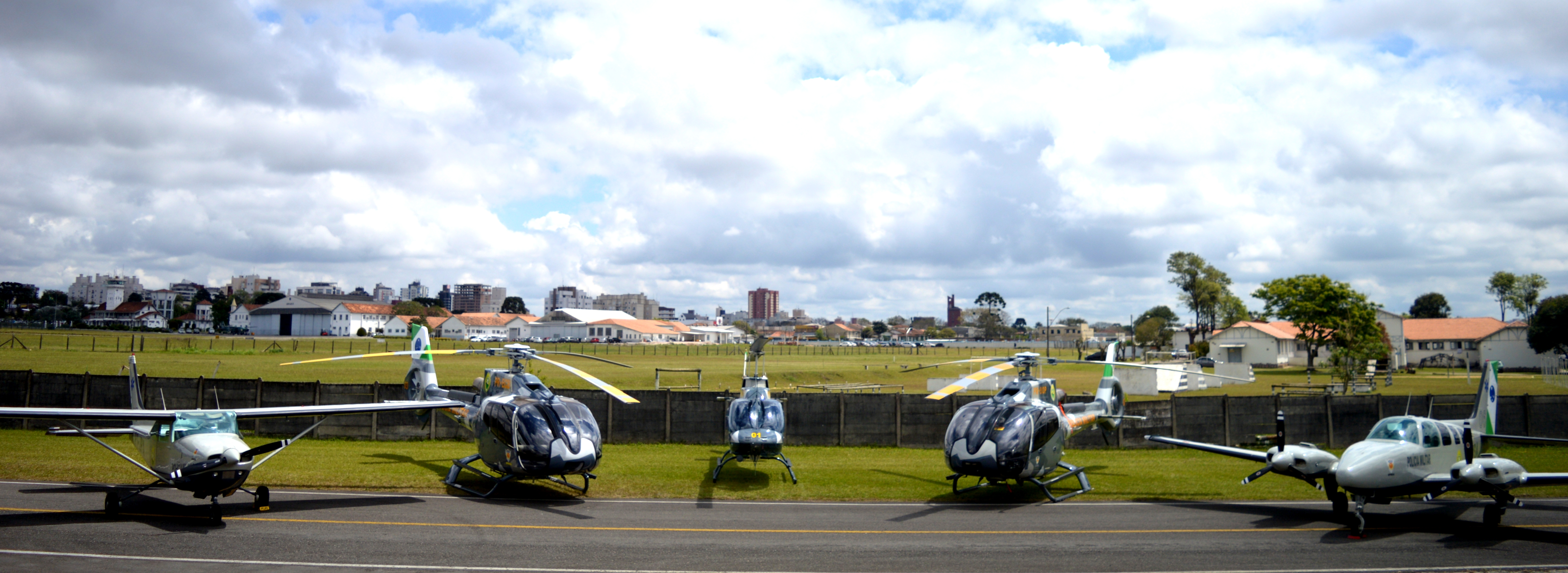 Aeronaves do Batalhão de Operações Aéreas da PMPR